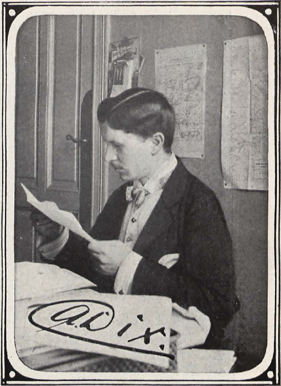 Arthur Dix (1875-1935), deutscher Journalist und Geopolitiker, aufgenommen 1905 (oder früher).